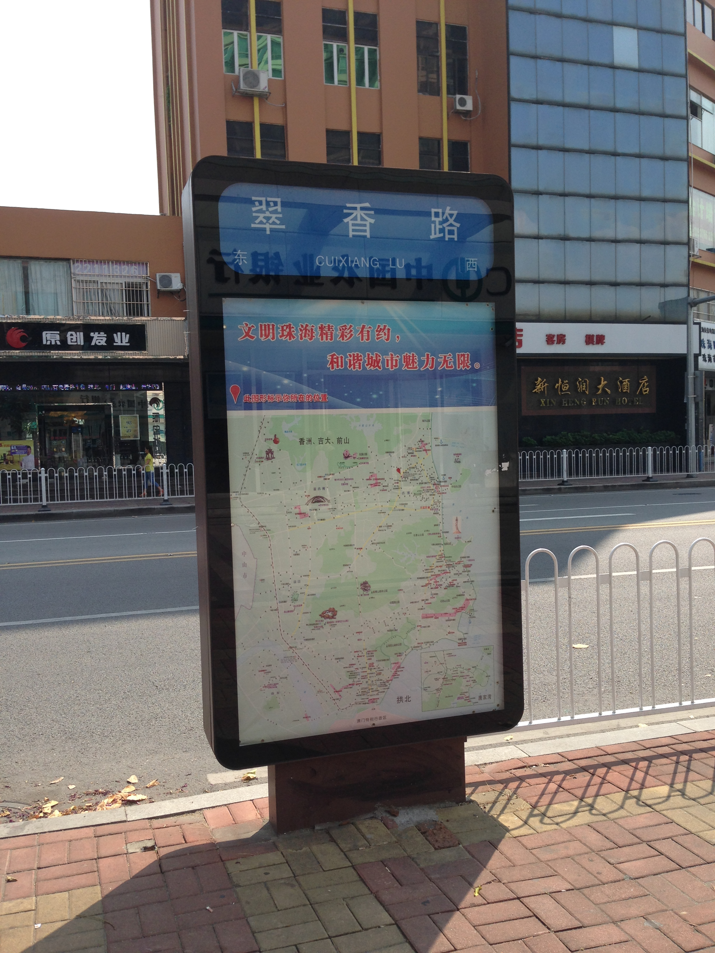 珠海翠香路